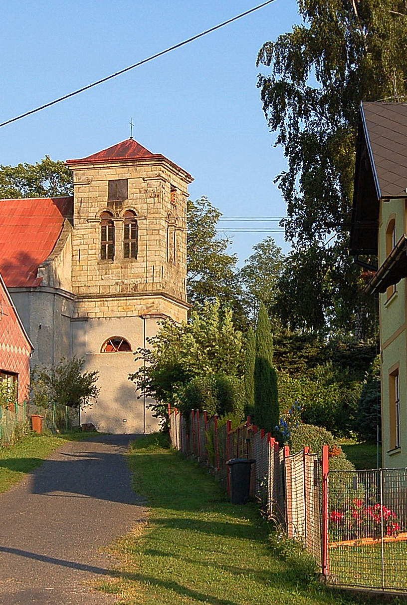 Halze-Blick zur Kirche